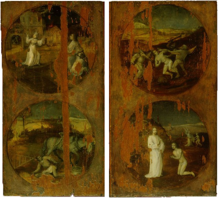 Fragments (exterior) of a triptych. See Jeroen Bosch De Zondvloed Binnenzijde for the interior.